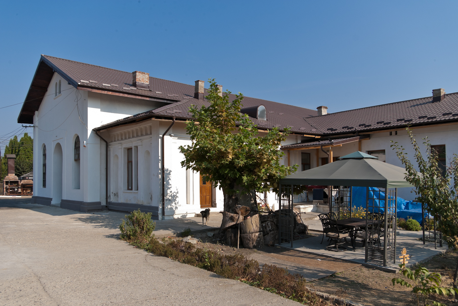 Fotografia prezinta Fabrica de butoaie "Ateneul" vazuta dinspre SE.